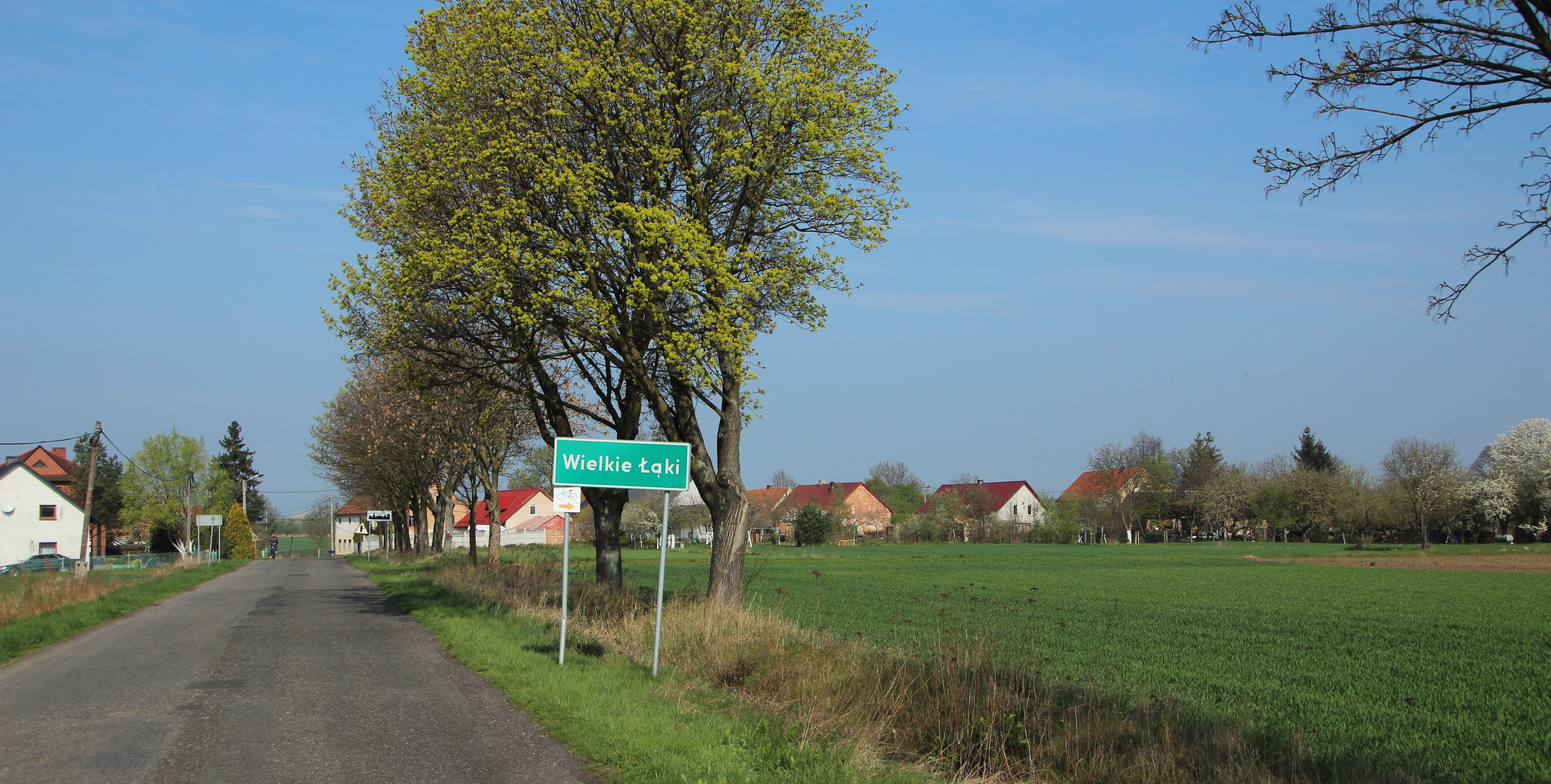 Wielkie Łąki – wieś w Polsce położona w województwie opolskim, w powiecie nyskim, w gminie Korfantów.